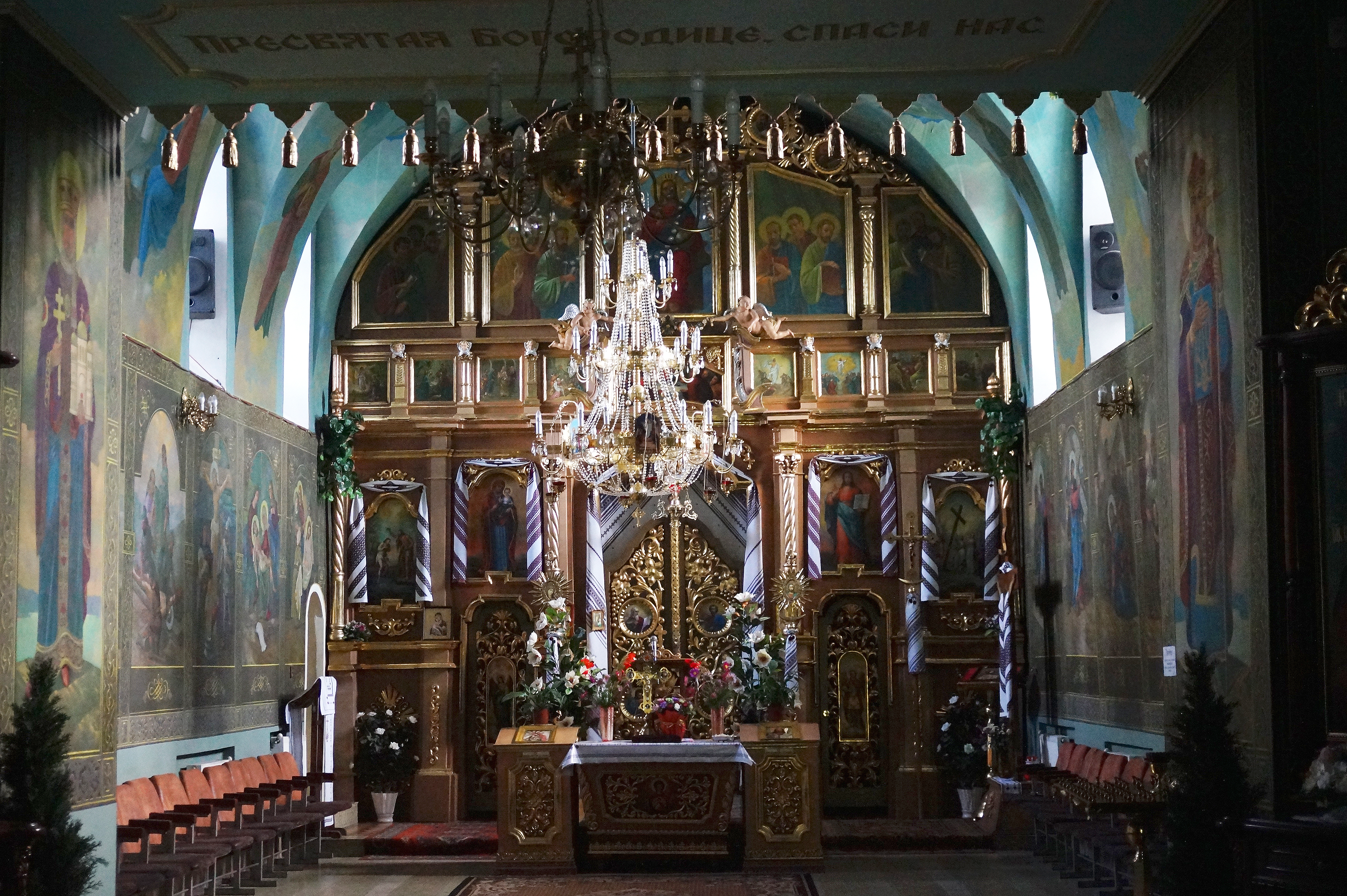 Здвиженська (Надставна) церква, Тернопіль, вул. Над Ставом, 16